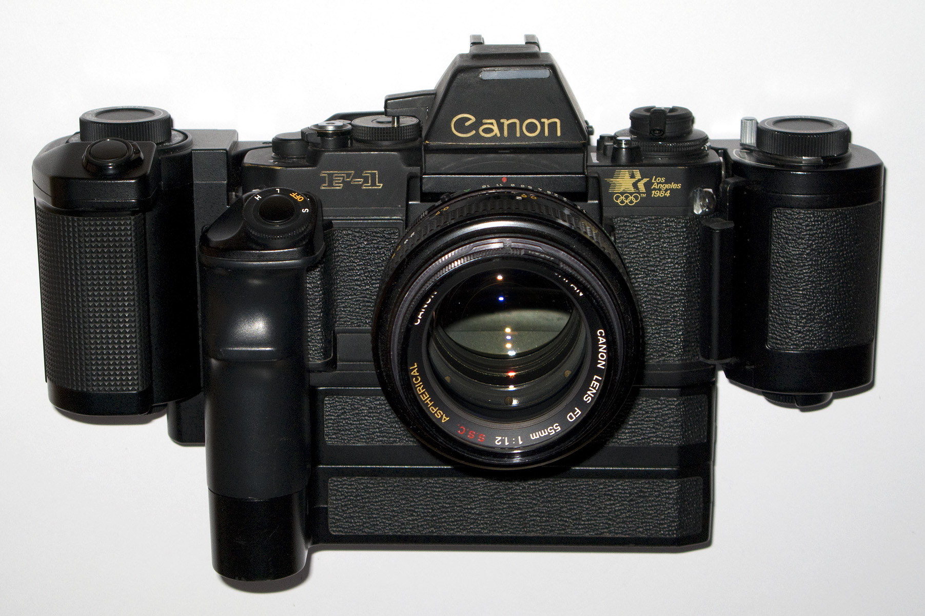 Canon F-1New AE Los Angeles 1984 mit Langfilmmagazin und 1.2/55mm ASPHERICAL